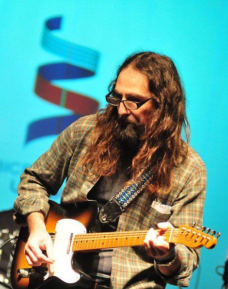 Alberto Wolf en 2011, en Las Vigilias - Barrio Peñarol. Foto: Bicentenario Uruguay